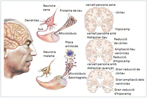 Comparacions entre cervells sans i afectats